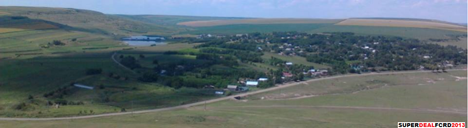 O VIZIONARE PLACUTA